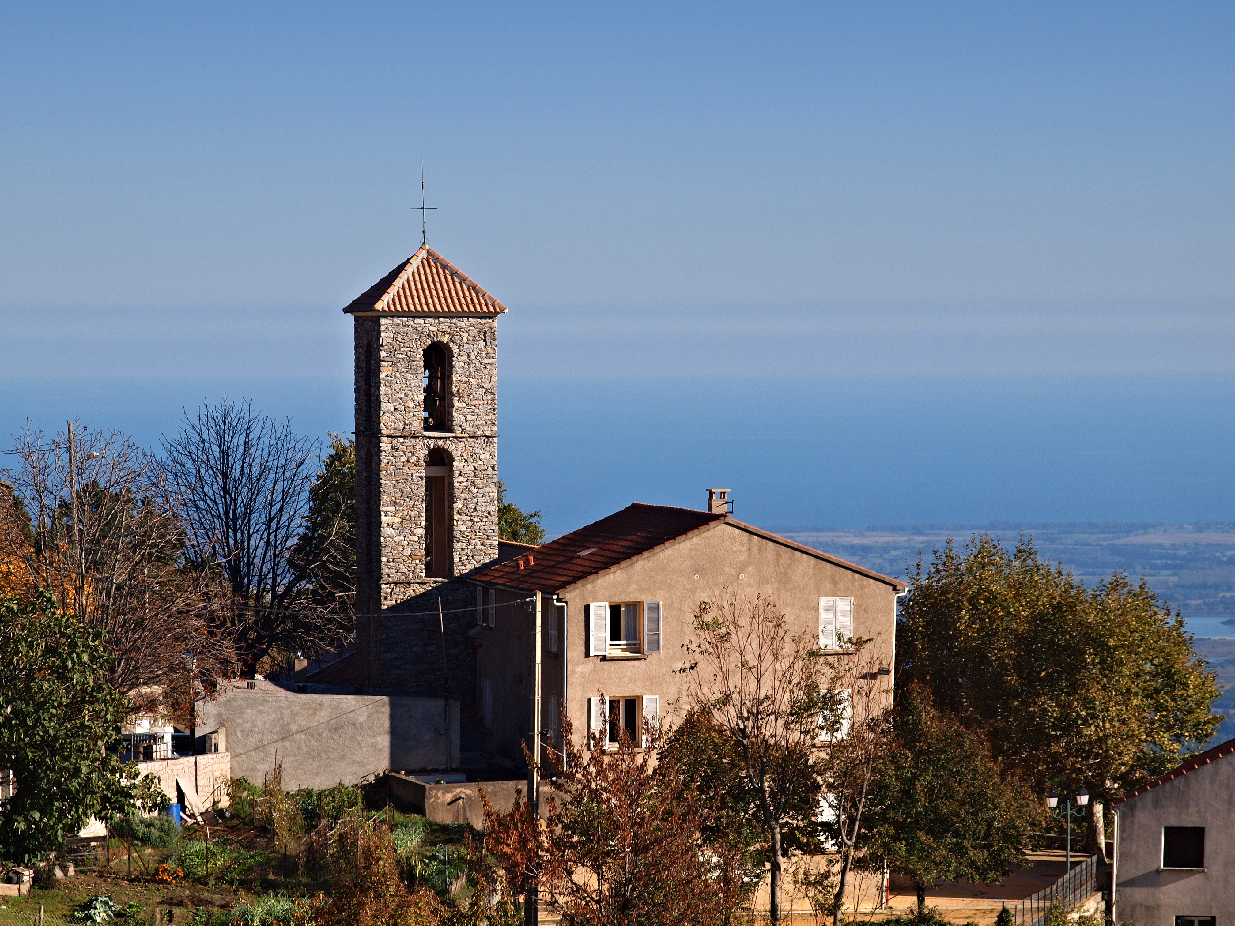 Antisanti (Corse) - Maison communale et église